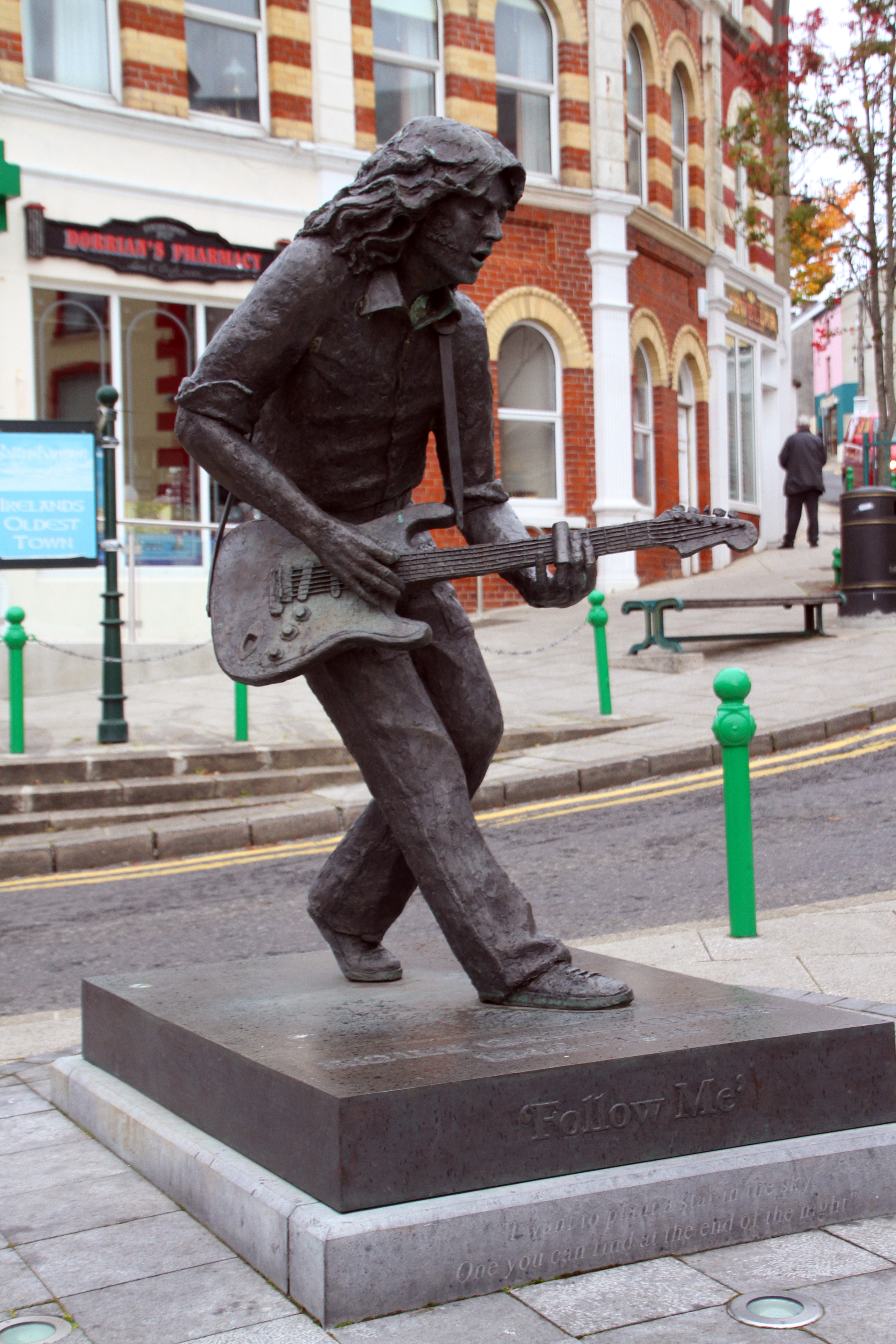 Ballyshannon